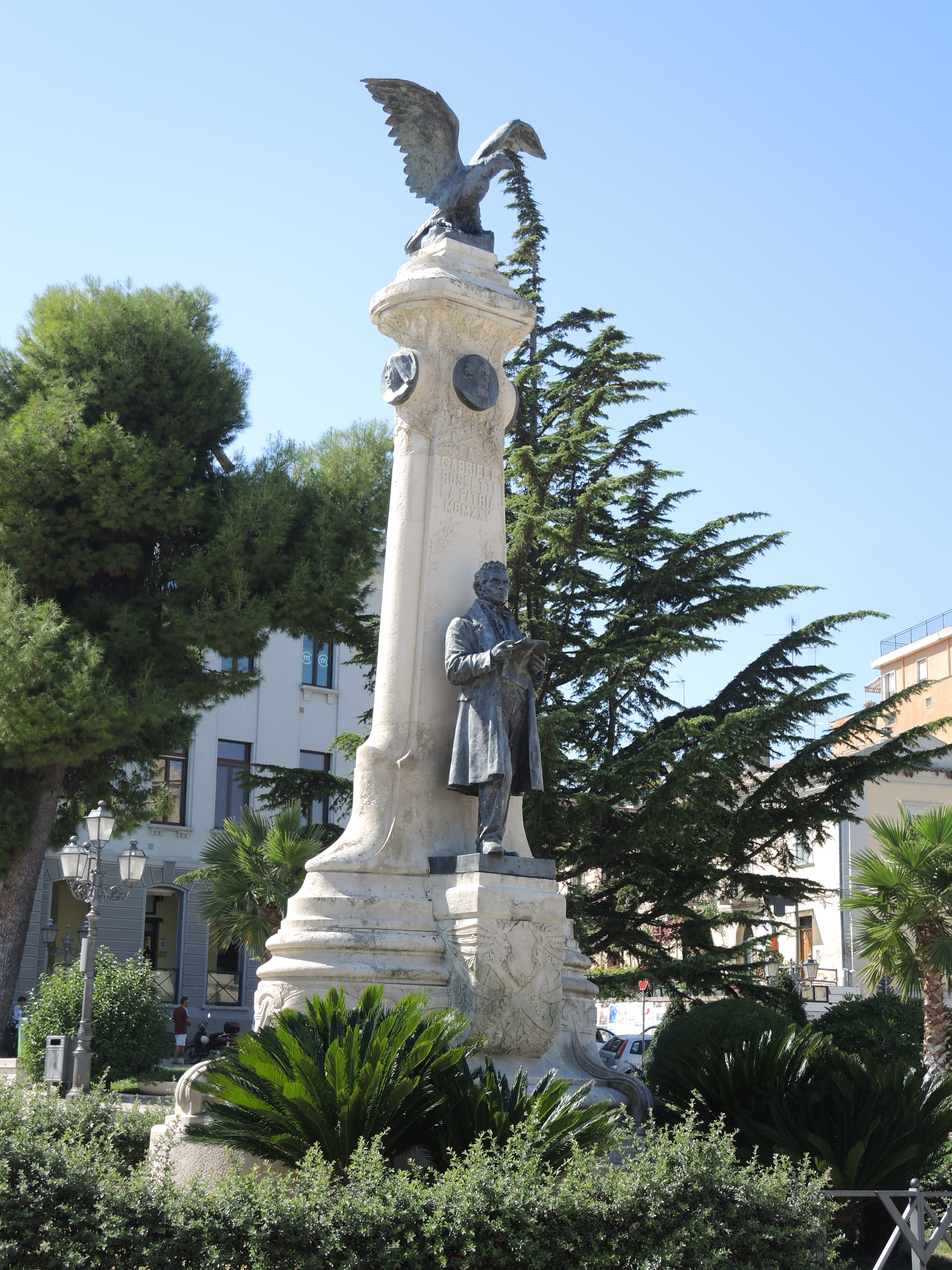 Monumento a Gabriele Rossetti This is a photo of a monument which is part of cultural heritage of Italy.